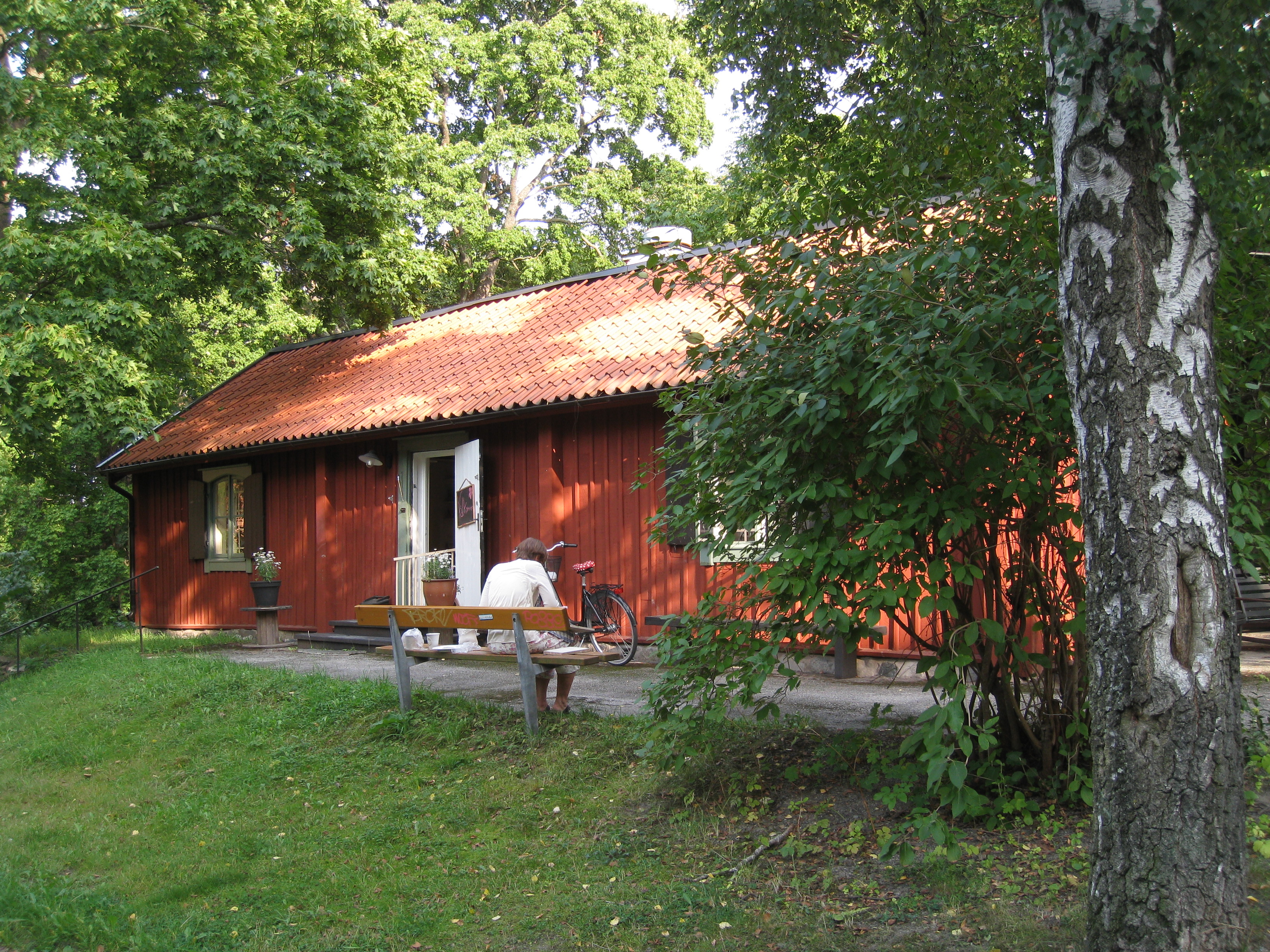 Alviks rättarbostad, '"Alvikstorpet", i Alvik i Bromma i västra Stockholm.